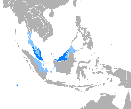 Idioma malayo